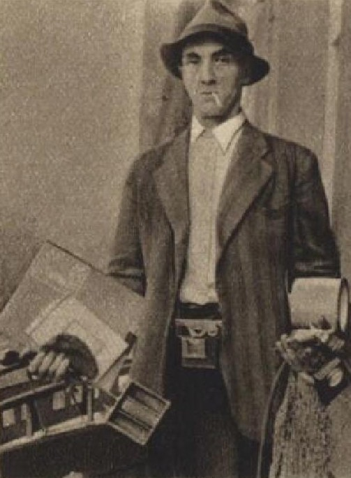 Přemysl Koblic (1892-1955), český fotograf, publicista a chemik.